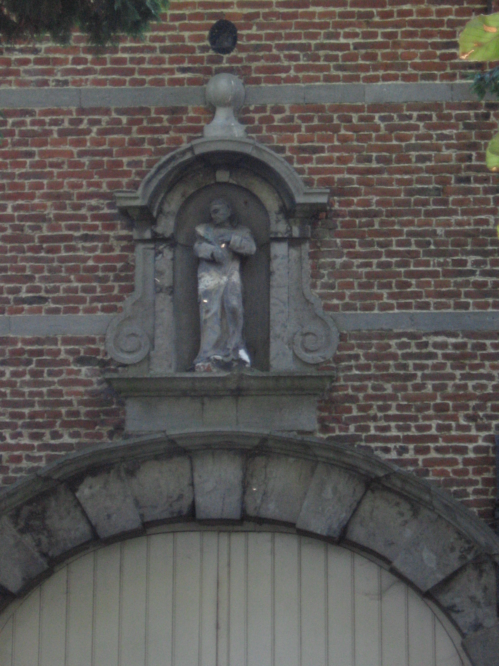 Statue de Saint Bruno au dessus du portail de l'ancienne chartreuse (Hérinnes, Belgique)